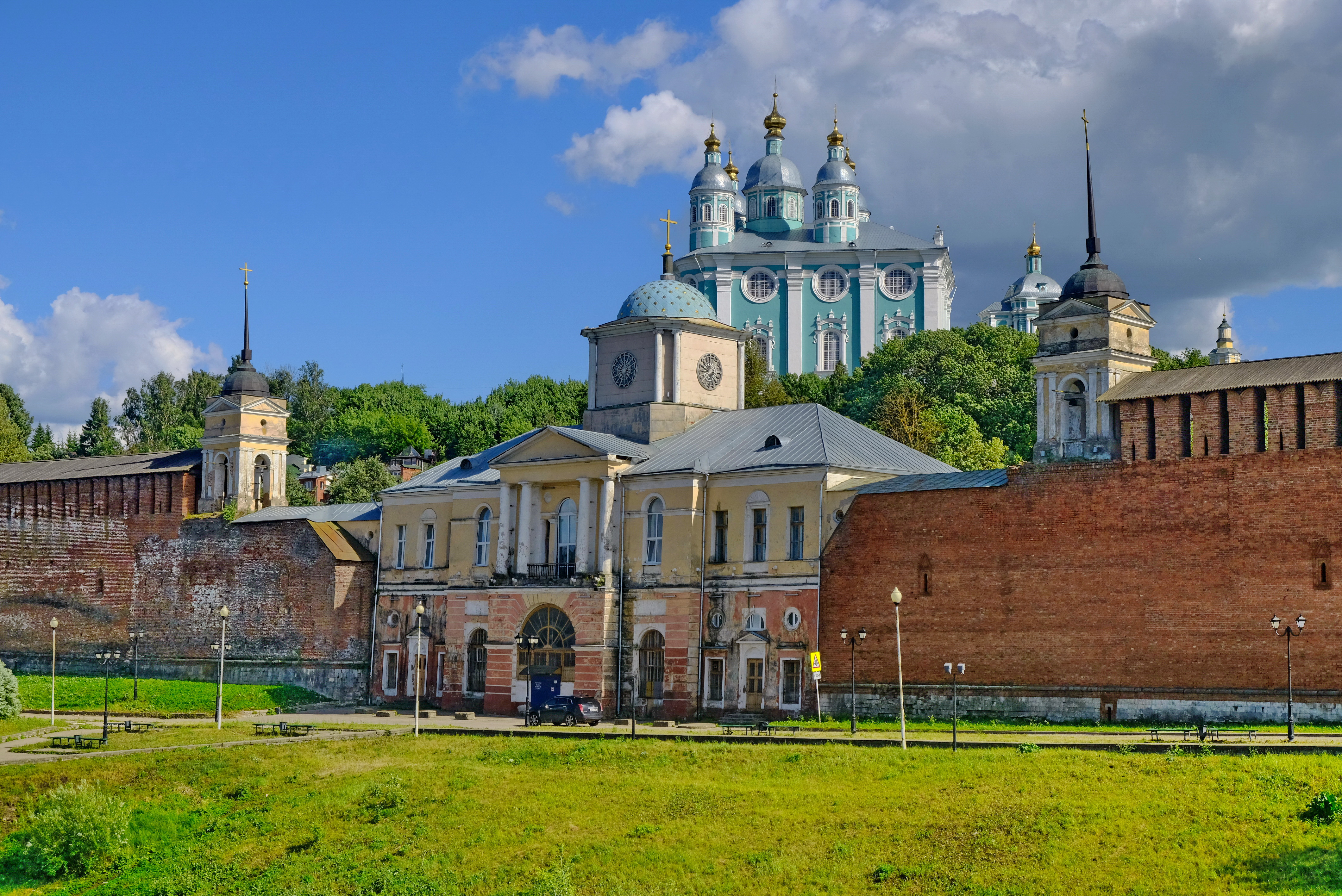 Днепровские ворота и Соборная гора в Смоленске